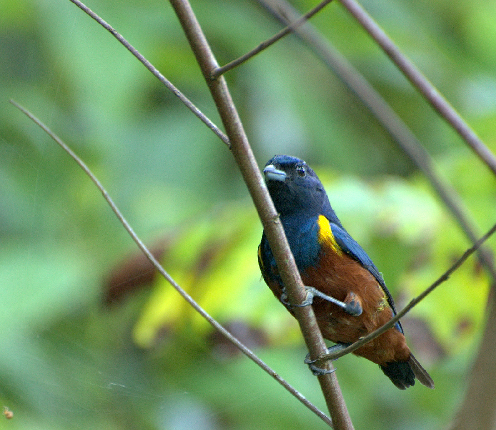 Vale do Ribeira - Registro-SP